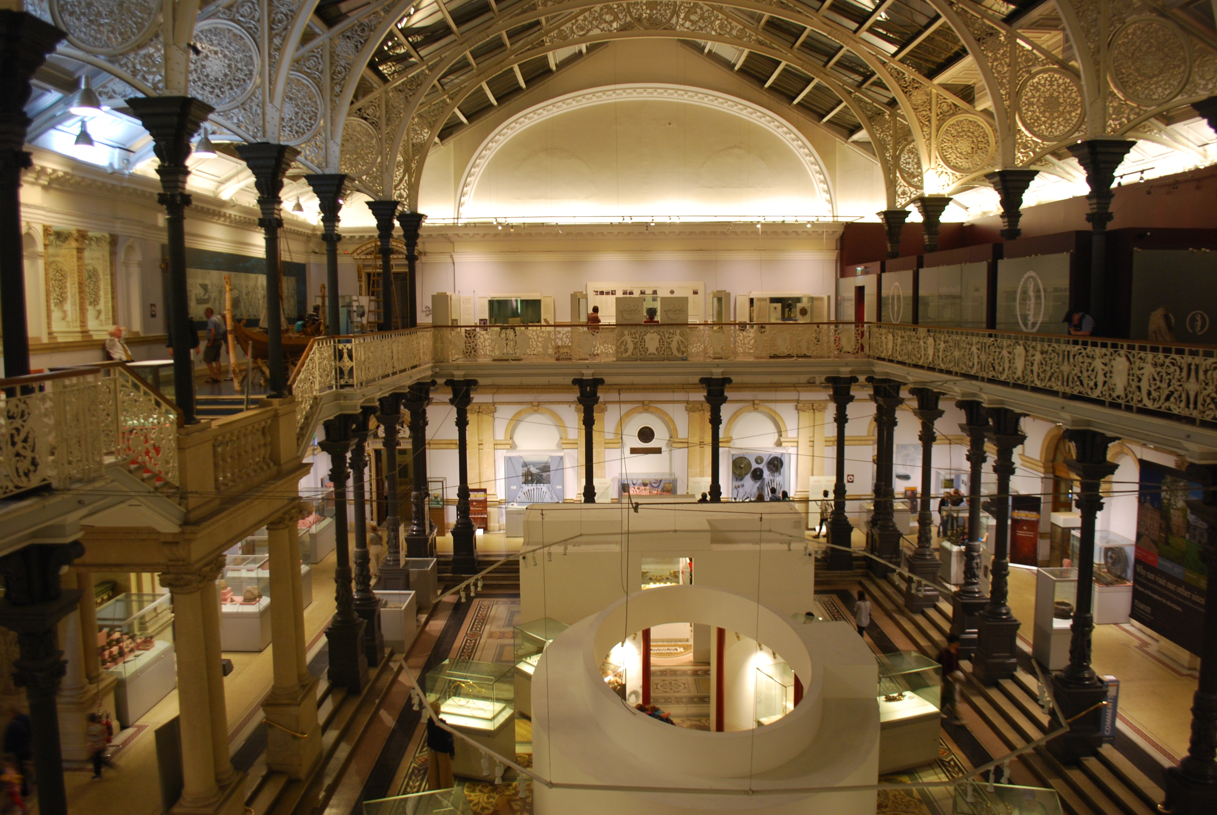 Vue du Musée national d'archéologie à Dublin.